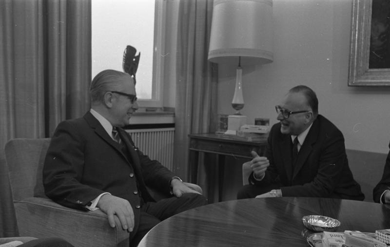 Bundestagspräsident von Hassel empfängt M. Rumor, Präsident der Europäischen Union Christlich-Demokratischer Parteien